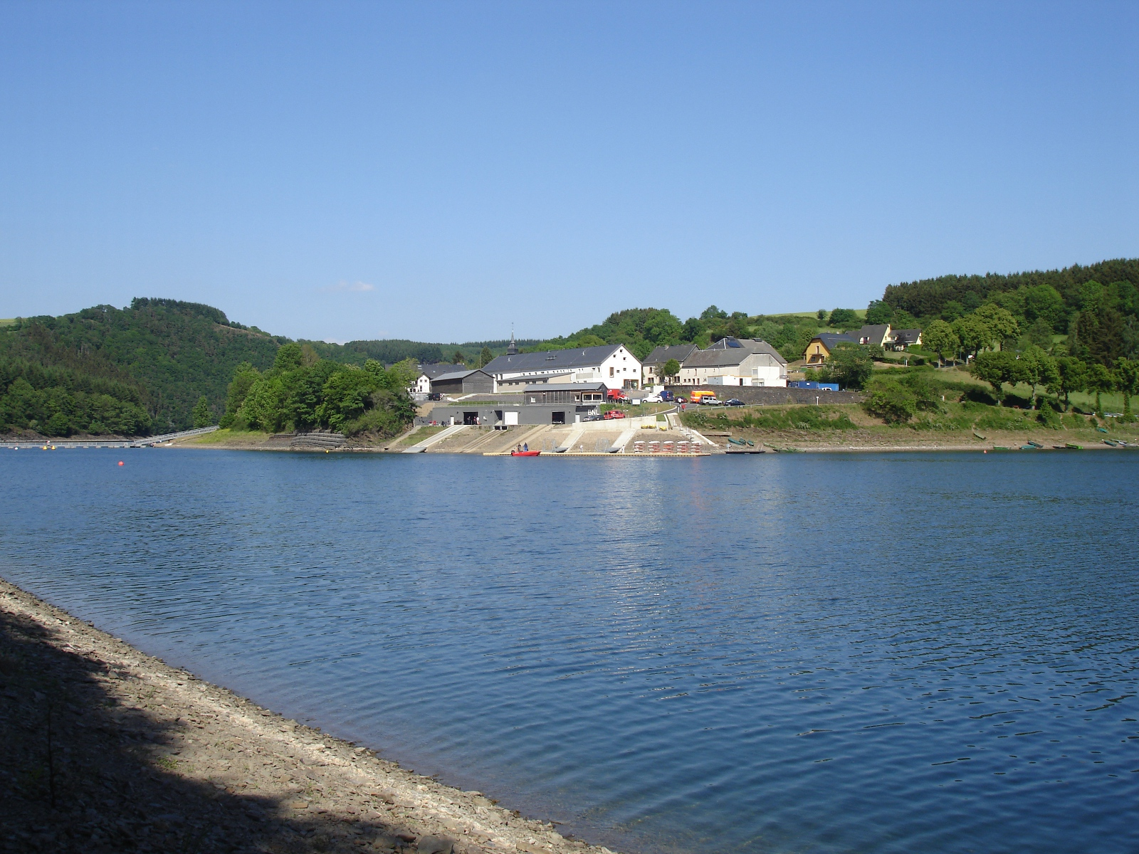 D'Uertschaft Lëlz mam Stauséi virdrun. Vir gesäit een d'Base nautique vu Lëlz.